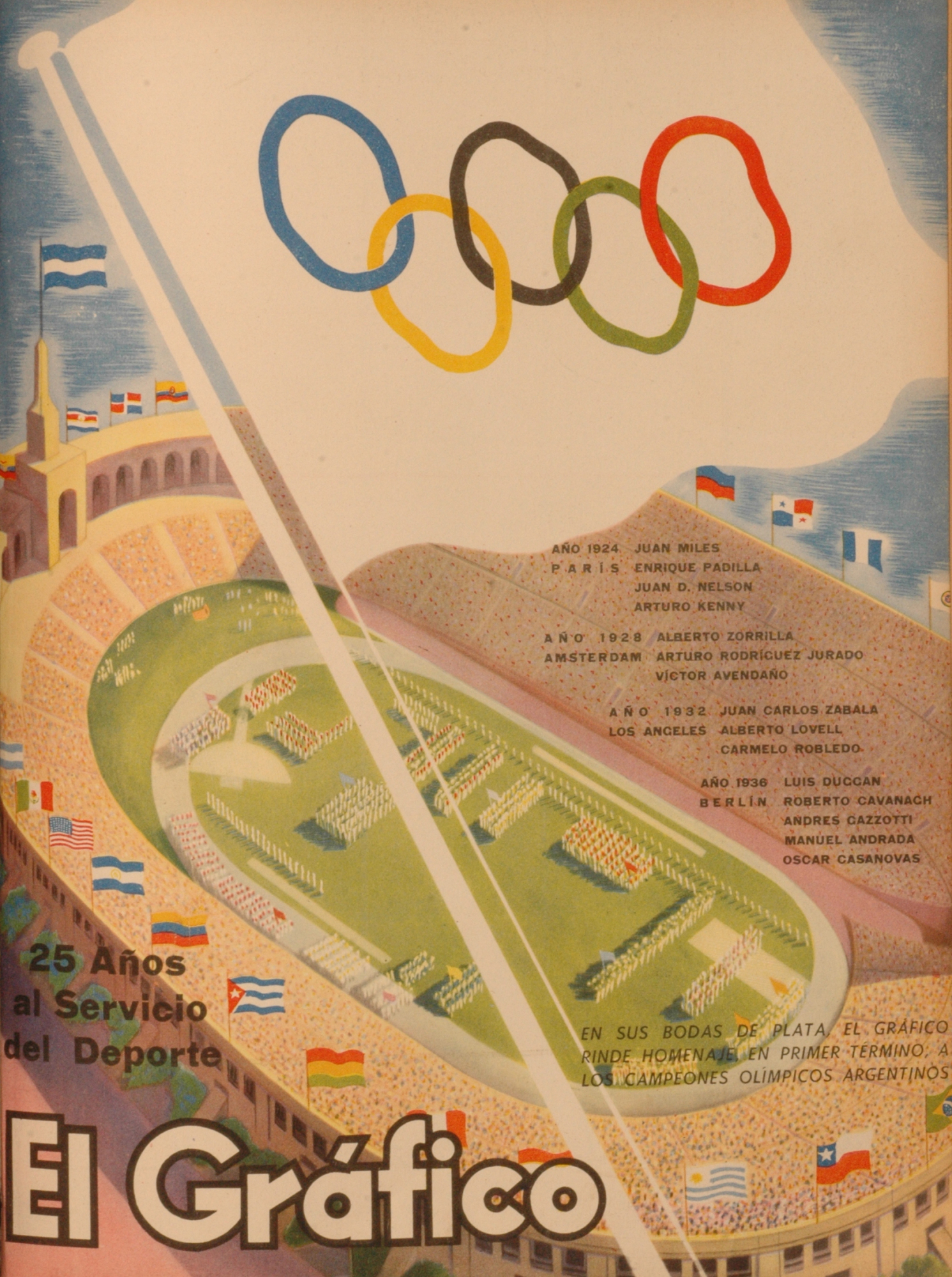 El Grafico del 23 de Junio de 1944. Edicion 1302